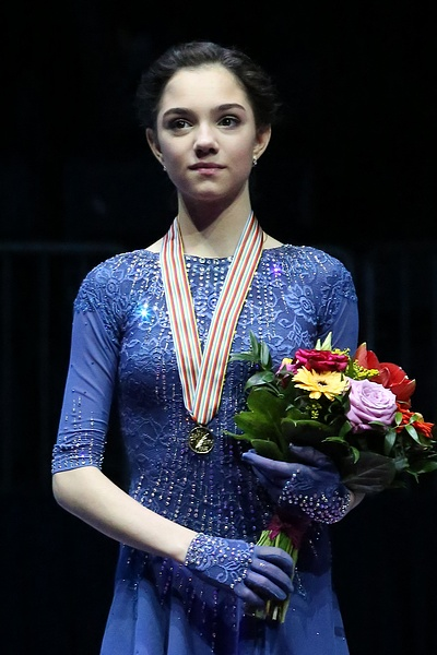 Евгения Медведева на подиуме чемпионата Европы по фигурному катанию 2016